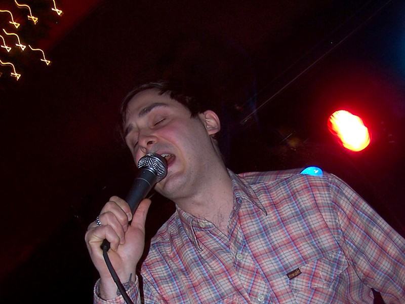 Tim Kinsella